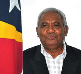 Virgílio Maria Dias Marçal, Abgeordneter aus Osttimor